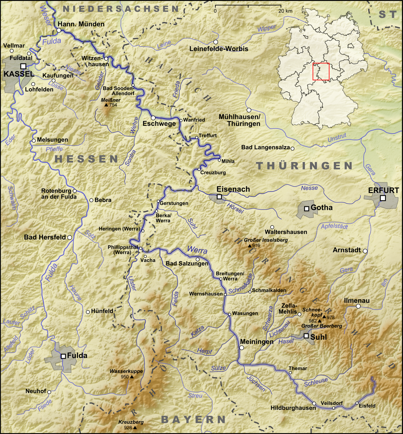 Die Werra und ihre Nebenflüsse